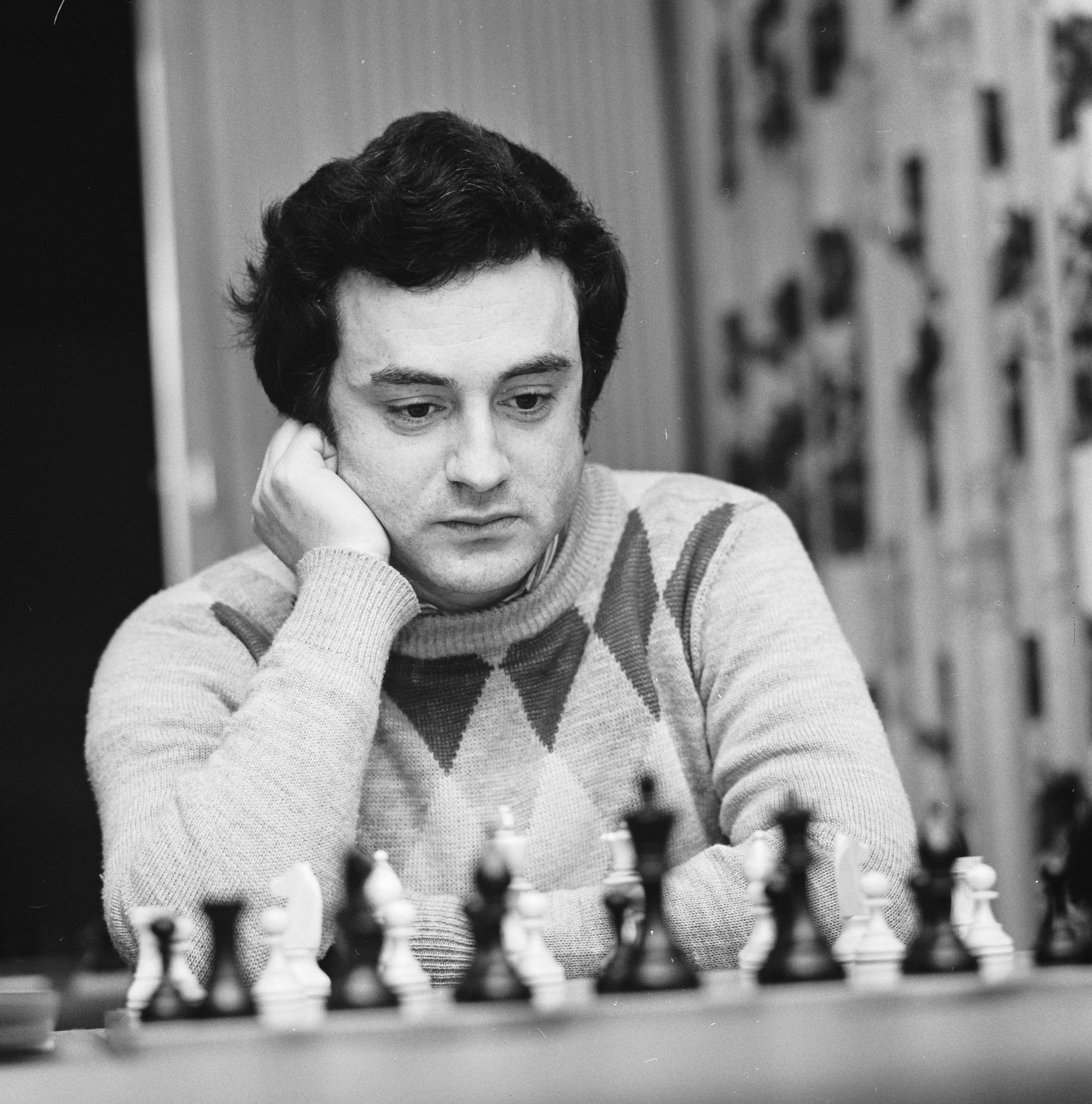 Collectie / Archief : Fotocollectie Anefo Reportage / Serie : Hoogovenschaaktoernooi te Wijk aan Zee Beschrijving : Sosonko tijdens een partij Datum : 15 januari 1974 Locatie : Noord-Holland, Wijk aan Zee Trefwoorden : portretten, schaken, schakers Persoonsnaam : Sosonko, Genna Instellingsnaam : Hoogovenschaaktournooi Fotograaf : Mieremet, Rob / Anefo Auteursrechthebbende : Nationaal Archief Materiaalsoort : Negatief (zwart/wit) Nummer archiefinventaris : bekijk toegang 2.24.01.03 Bestanddeelnummer : 926-9437